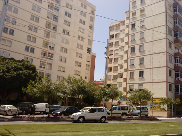 Cruz del Señor (Santa Cruz de Tenerife)